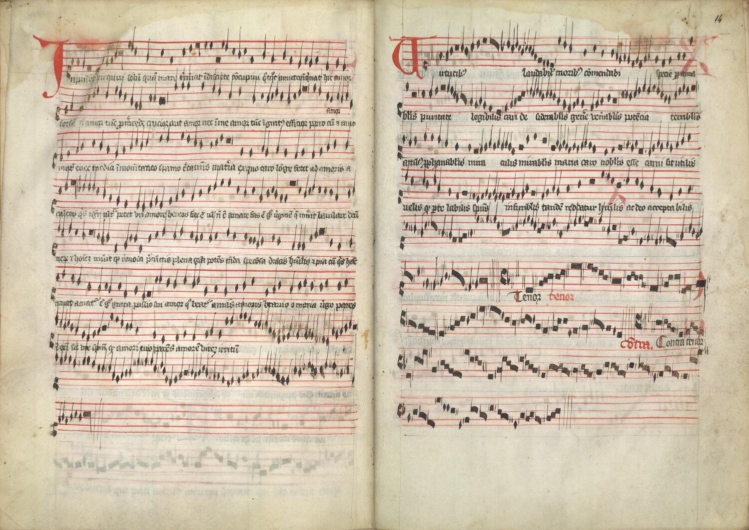 Apt, Cathédrale Sainte-Anne, Bibliothèque du Chapitre, 16bis